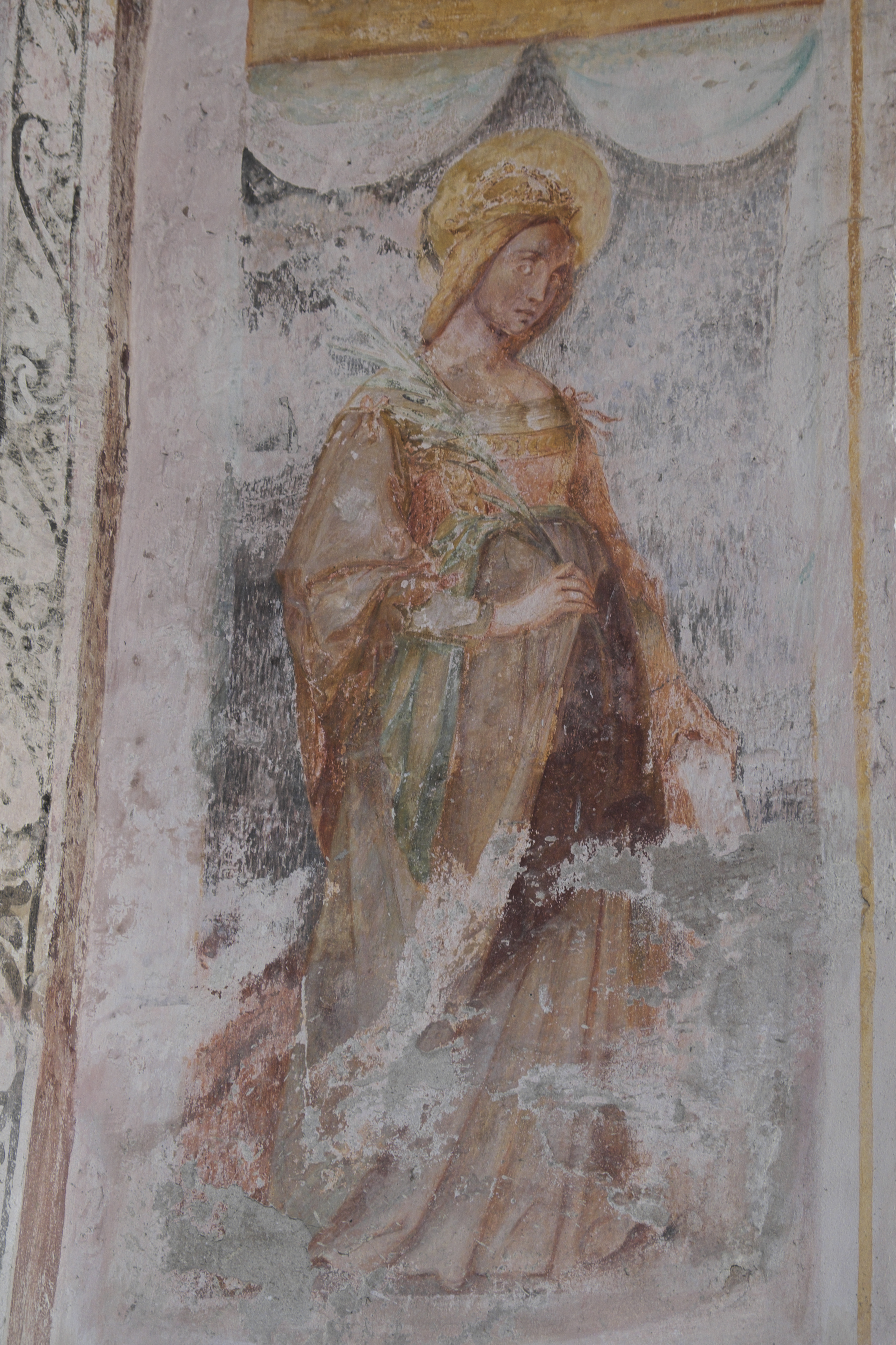 Katholische Friedhofskirche St. Salvator und Sebastian in Weilheim in Oberbayern im Landkreis Weilheim-Schongau (Bayern/Deutschland), Freskenzyklus zur Passion Christi von Elias Greuter (Greither) dem Älteren zwischen 1591 und 1615 geschaffen; Darstellung: Heilige Katharina